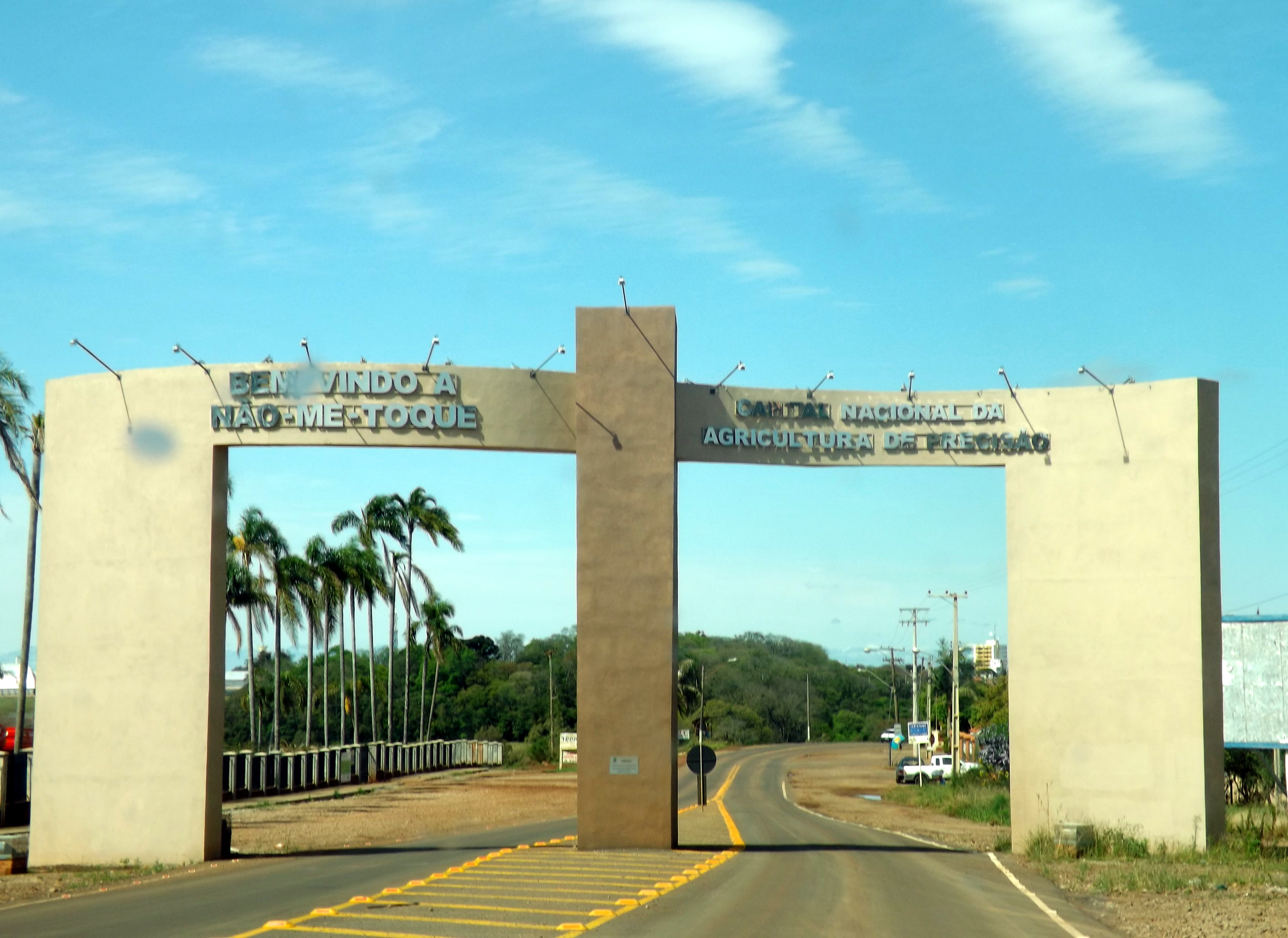 Bem Vindo a Não me Toque - Capital Nacional da Agricultura de precisão